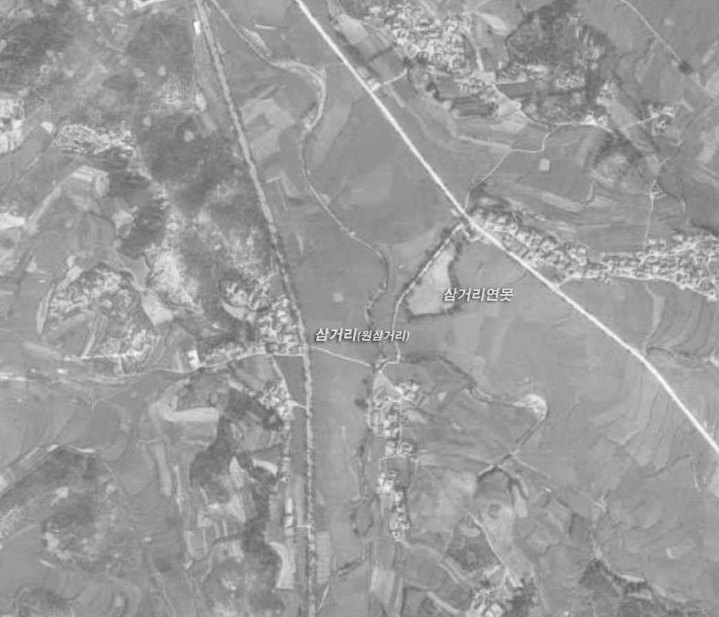 천안삼거리(원삼거리)-1966년 사진